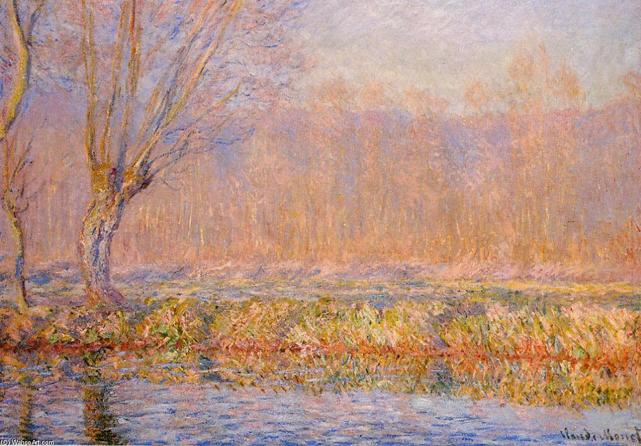 Das Bild zeigt eine Weide im Frühling am Fluss Epte, in der Nähe von Giverny. Die morgendliche, kühle Stimmung hält Monet in Pastellfarben fest.